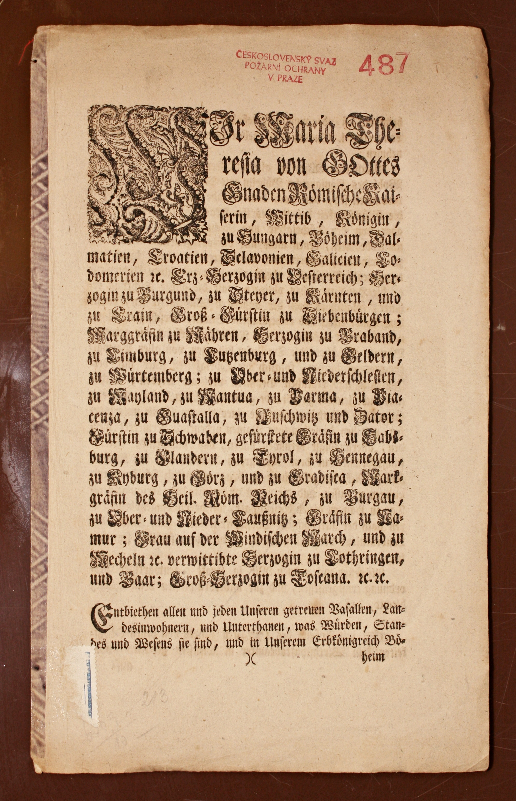 Pořární řád Marie Terezie, titulní strana